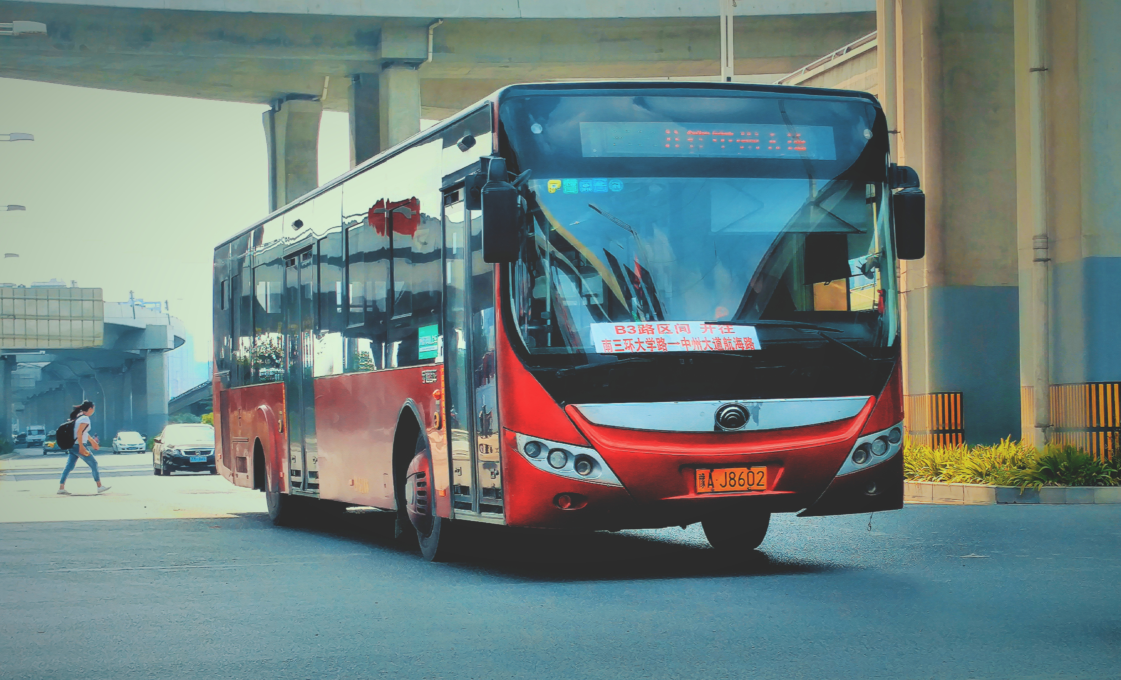 郑州快速公交B3路区间车，使用ZK6128HGK车型，行驶于南三环，2017年5月。此车型曾为郑州BRT早期主力车型之一，但目前已全数退役。